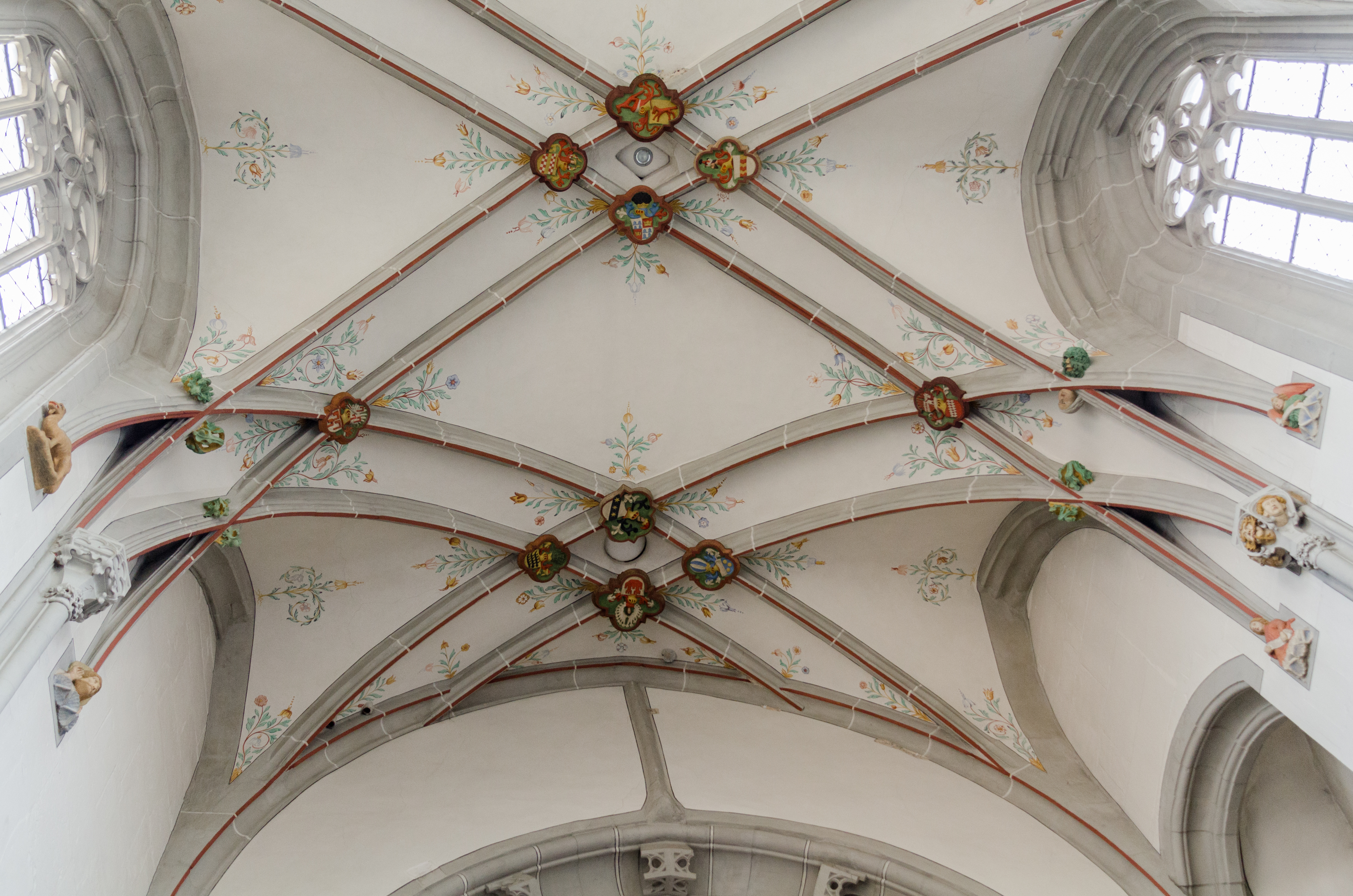 Haßfurt, Ritterkapelle Mai 2015